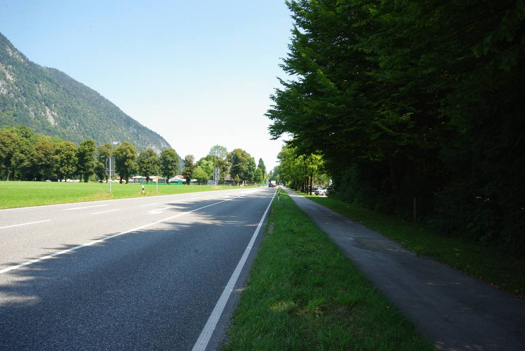 Loferer Straße (B20/B21) in 83435 Bad Reichenhall